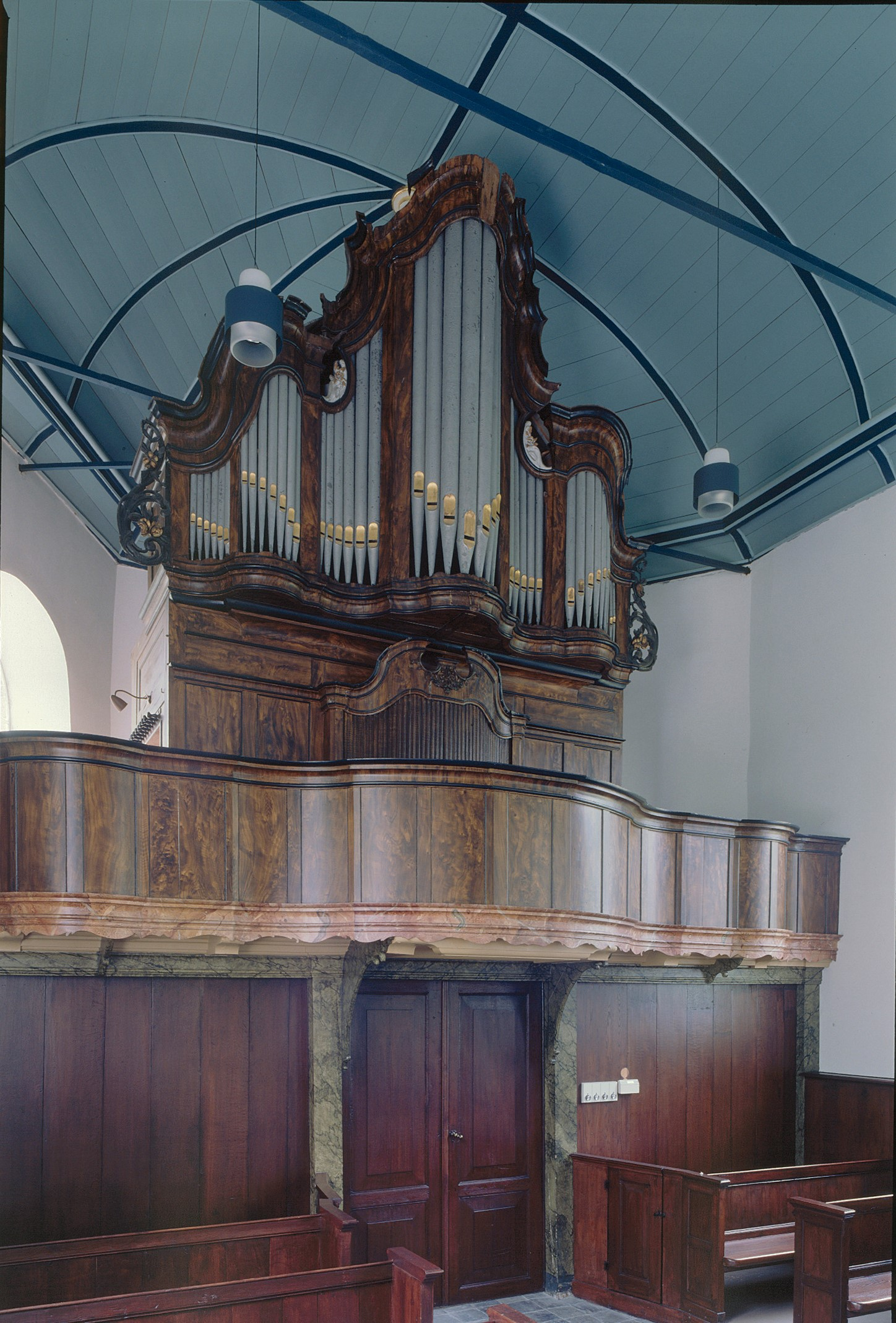 Nederlands Hervormde Kerk: Interieur, aanzicht orgel, orgelnummer 1787 (opmerking: Gefotografeerd voor Het Historische Orgel in Nederland 1769-1790)